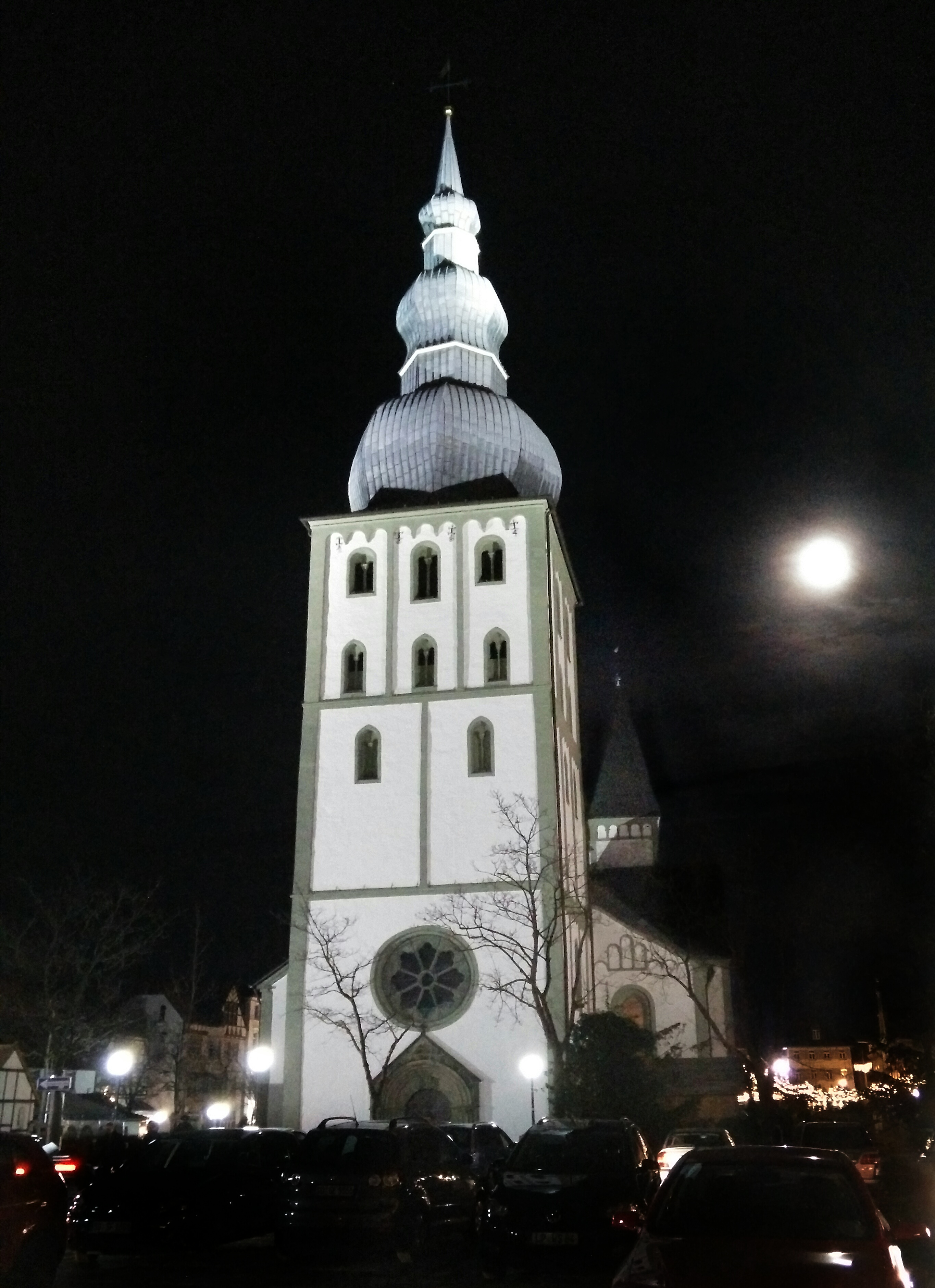 Marienkirche, Lippstadt bei Vollmond This is a photograph of an architectural monument.